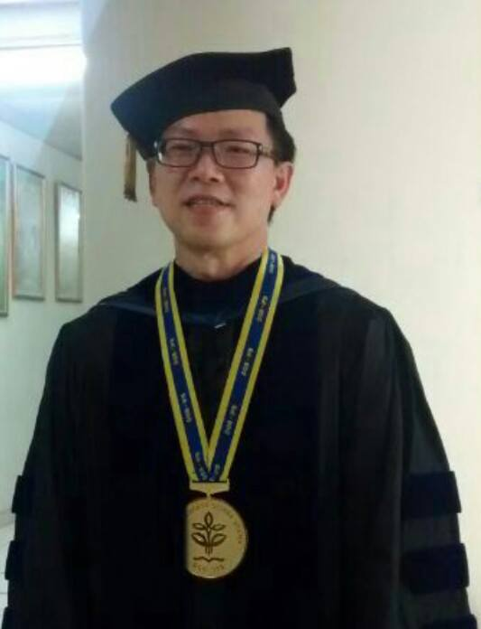 Penobatan Guru Besar di Institut Pertanian Bogor